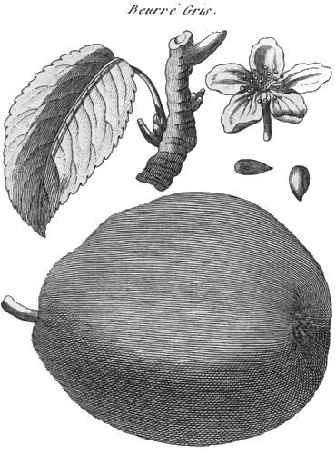 Rozier. Cours d'agriculture, tome 8, planche 14, Beurré Gris (poire)